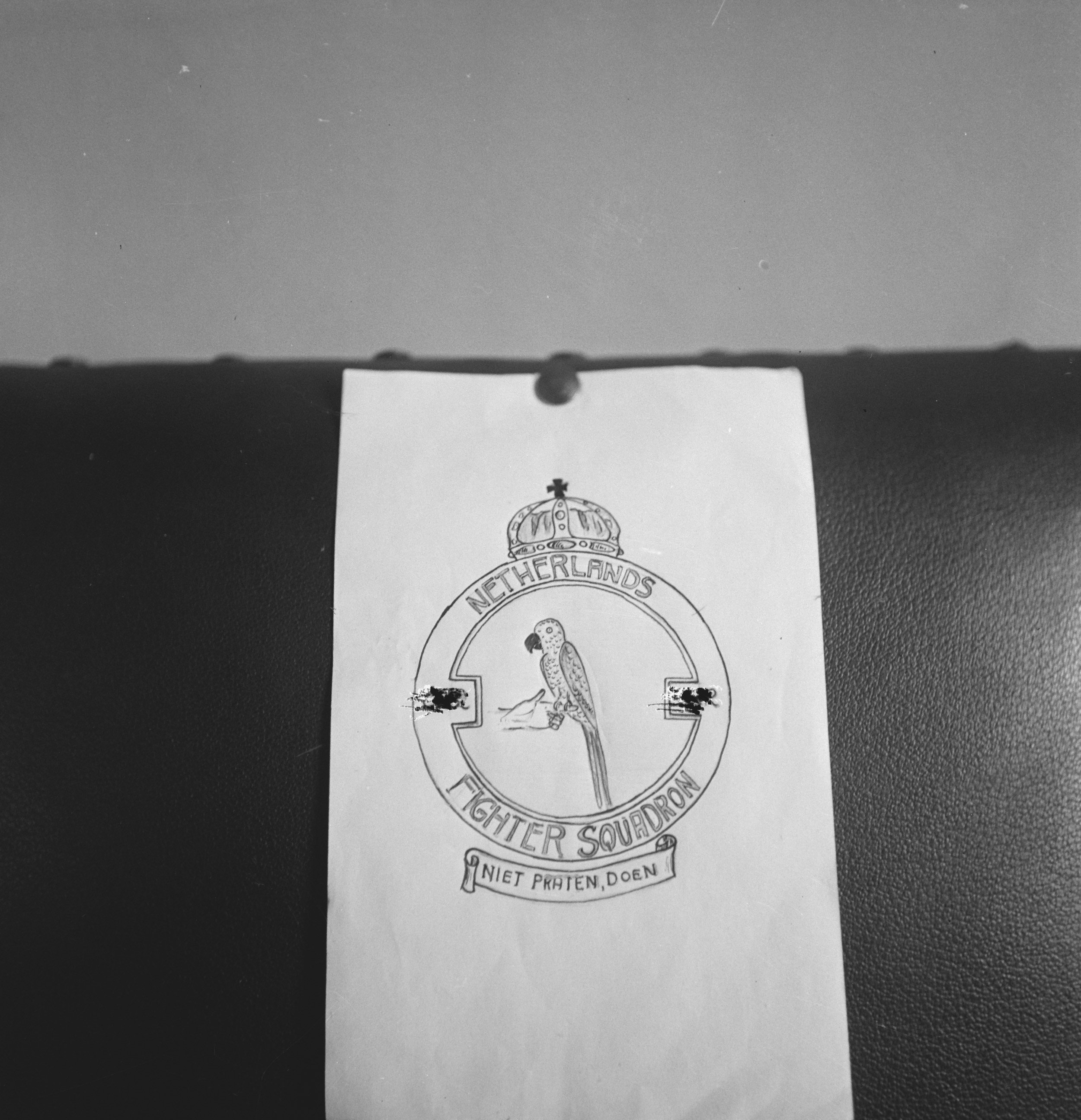 Collectie / Archief : Fotocollectie Anefo Reportage / Serie : 322 (Dutch) squadron RAF Beschrijving : Bijschrift "Design for crest of the Dutch Fighter Squadron" [Ontwerp van het embleem van het squadron] Annotatie : Het embleem bevat een afbeelding van de mascotte de papegaai Polly Grey en de spreuk "Niet praten, doen" Datum : {1940-1945} Locatie : Groot-Brittannië Trefwoorden : emblemen, luchtmacht, tweede wereldoorlog Fotograaf : [onbekend] Auteursrechthebbende : Nationaal Archief Materiaalsoort : Negatief (zwart/wit) Nummer archiefinventaris : bekijk toegang 2.24.01.03 Bestanddeelnummer : 934-8779